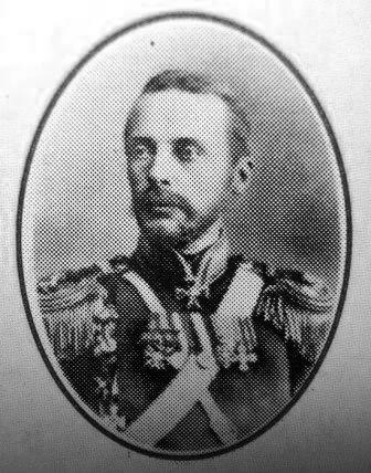 Aruküla mõisnik Peter von Baranoff